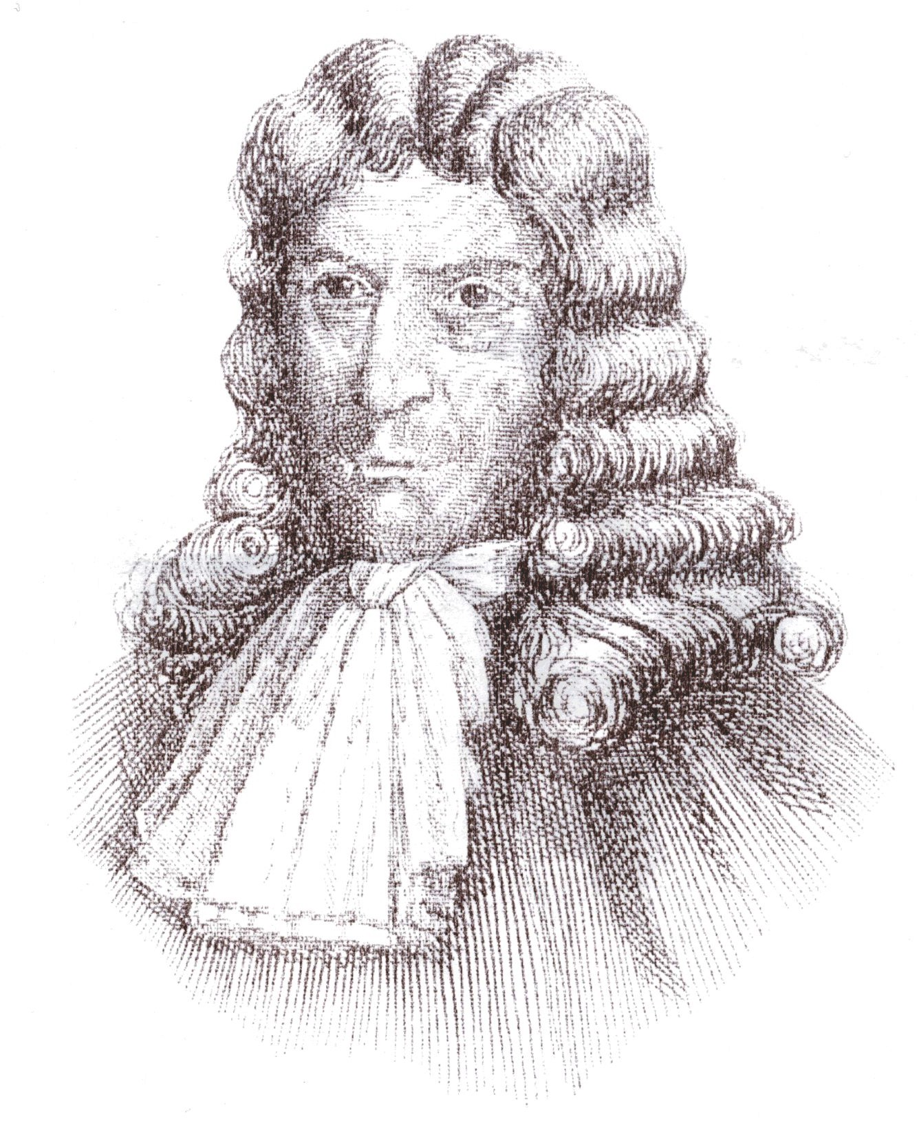 Denis Papin nach einem Stich um 1706